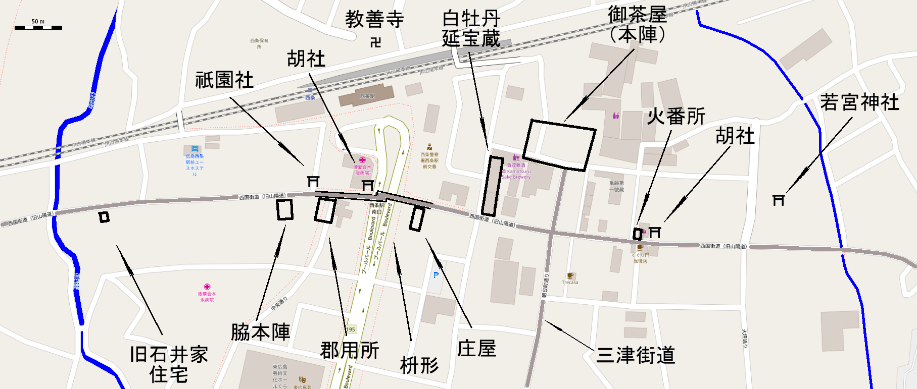 2018年東広島市西条地区地図に、江戸期の宿場西条四日市宿時代にあった建物を示したもの This map may be incomplete, and may contain errors. Don't rely solely on it for navigation.